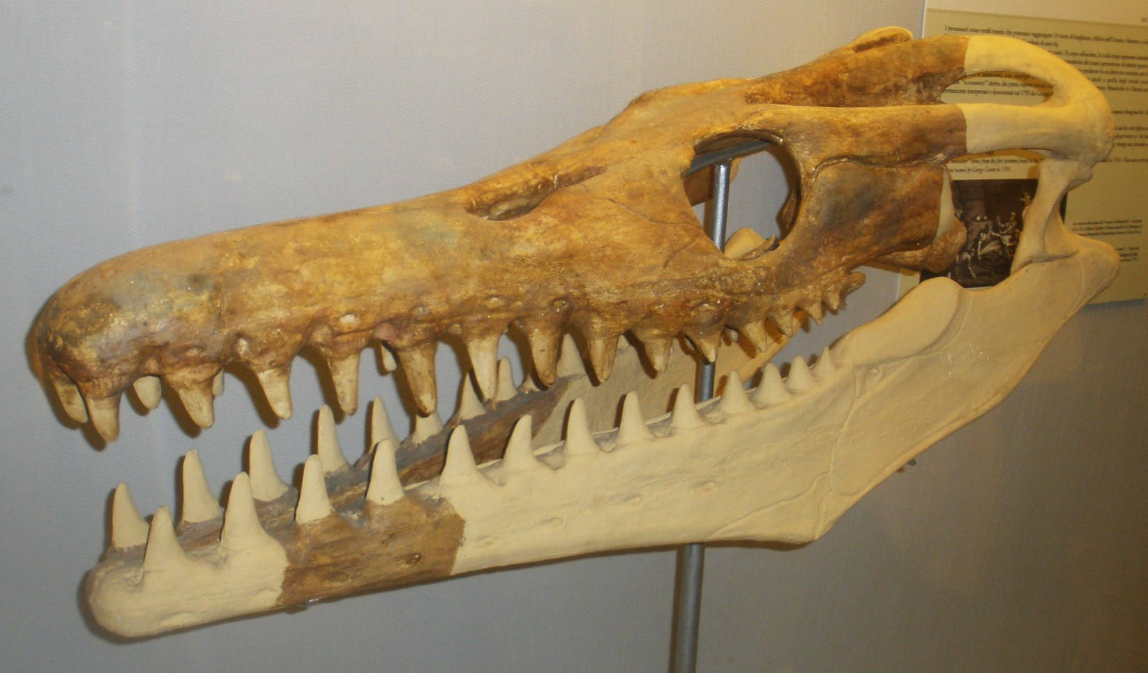 Fossil of Goronyosaurus, an extinct reptile- Took the picture at Museo di Paleontologia di Firenze